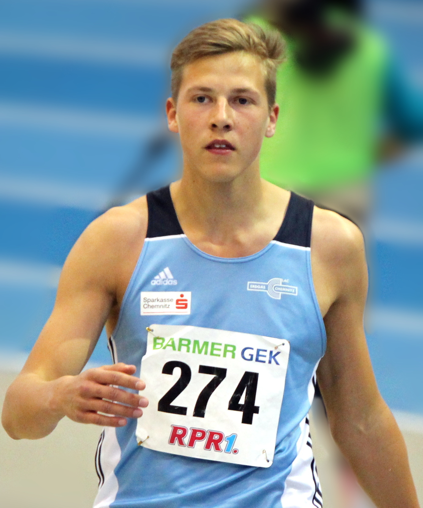 Max Heß